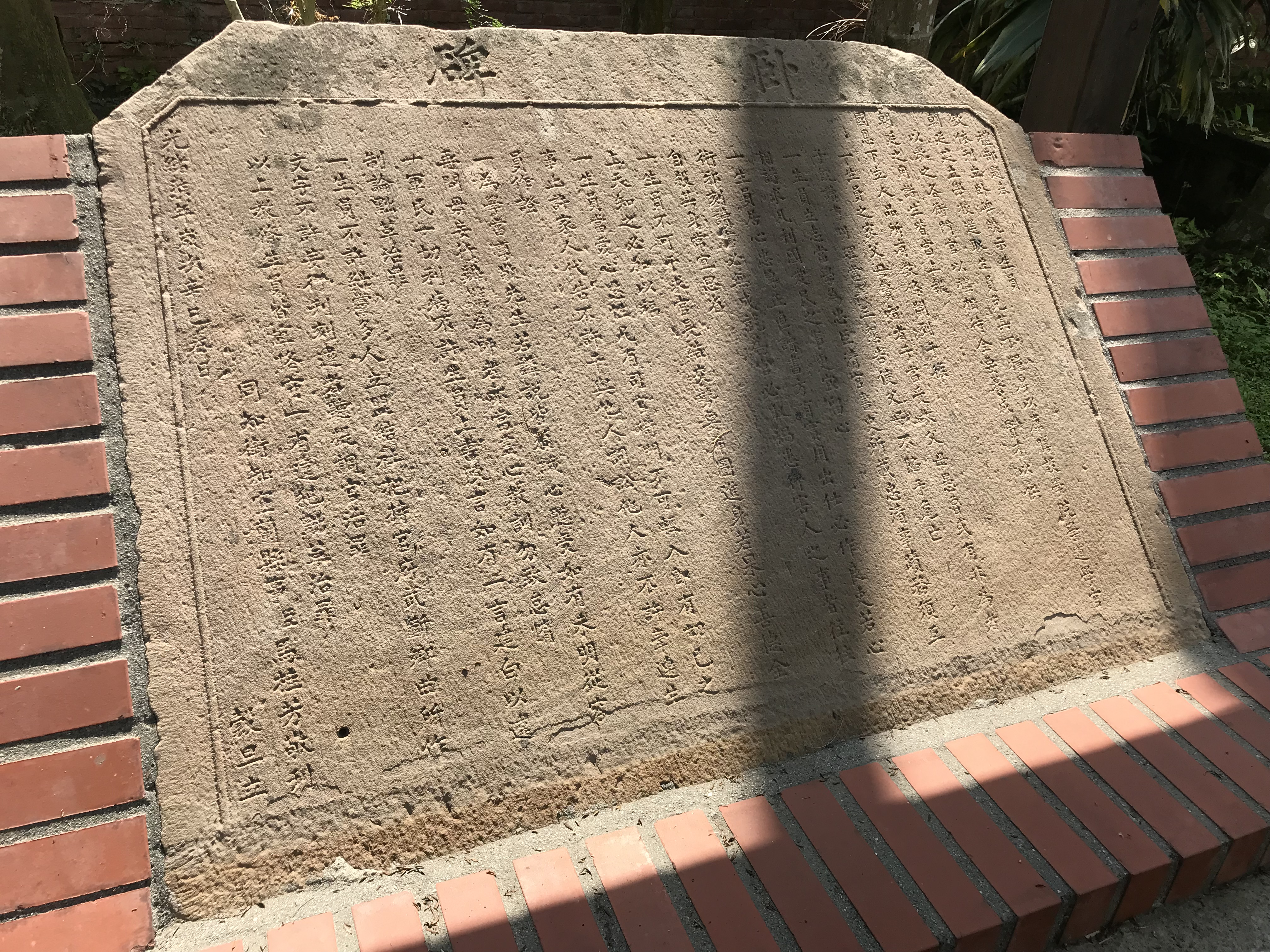 中文（台灣）: 宜蘭孔子廟臥碑